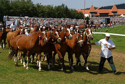 Die Freiberger ist eine beeindruckende Pferderasse